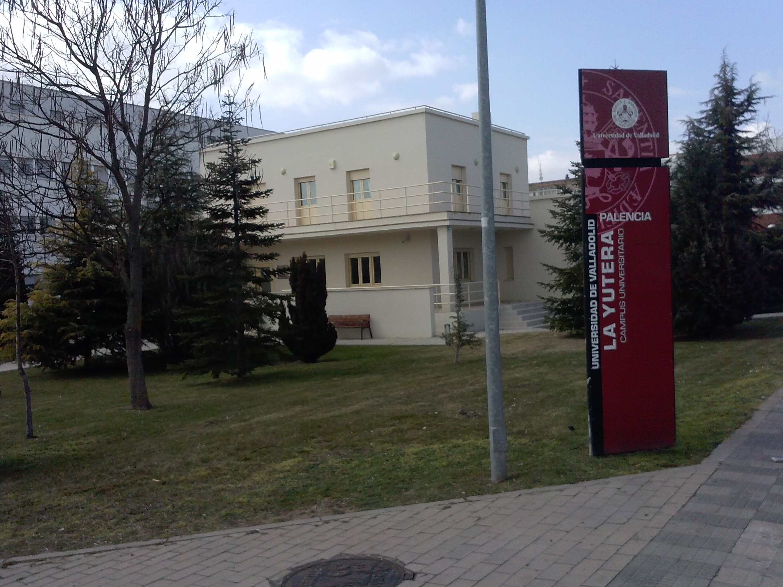 Vista del edificio administrativo del Campus Universitario de Palencia.Universidad de Valladolid